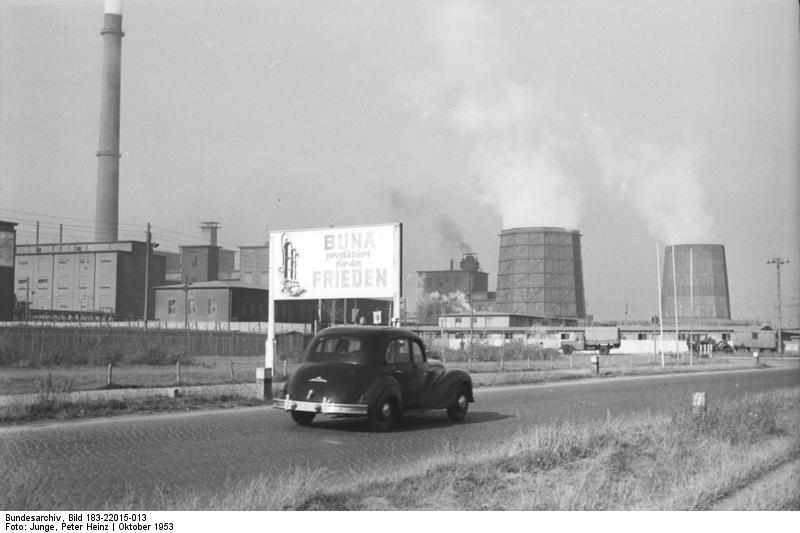 Zentralbild/Junge 27.10.1953 SAG-Betrieb-Buna in Schkopau wird den Werktätigen unserer Republik übergeben Bei den Verhandlungen der Deutschen Regierungsdelegation vom 20. und 22.8.1953 in Moskau, die im Sinne tiefer Freundschaft und in voller Gleichberichtigung der beiden Staaten verlief, kam die sowjetische Regierung zu dem Entschluß, die Chemischen Werke Buna in Schkopau, die zu den größten und wichtigsten Betrieben unserer Republik gehören, sowie die anderen 32 SAG- Betriebe, ab 1.1.1954 kostenlos den Werktätigen unserer Republik zu übergeben. UBz.: Blick auf einen Teil des Werkes